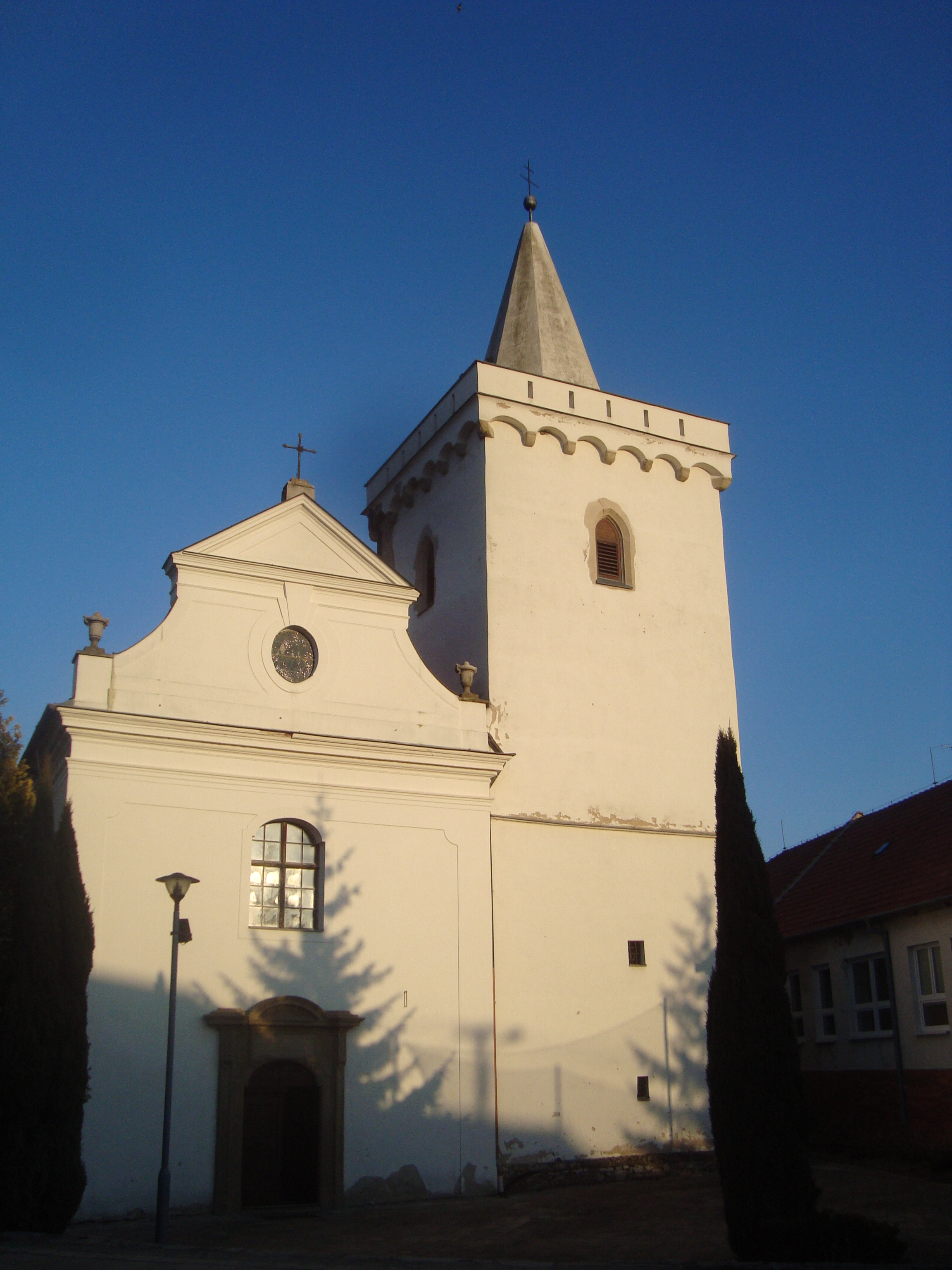 Kostel Navštívení Panny Marie, Pravlov